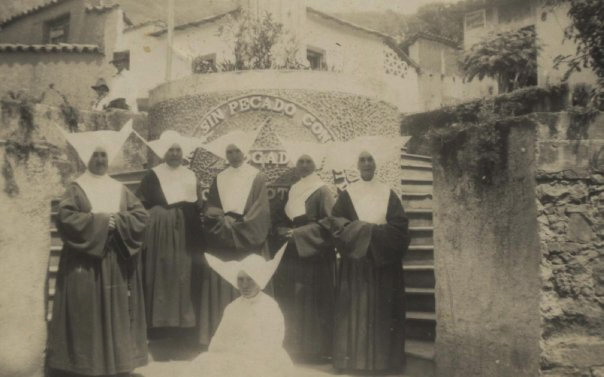 Comunidad de hermanas de San Vicente de PAul, en el hospital fundado por dicha comunidad. Gramalote, Norte de Santander. Colombia